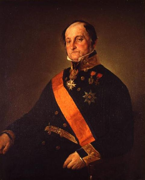 Ritratto di Ambrogio Nava, olio su tela, 90 x 75 cm., Civiche Raccolte d’Arte di Palazzo Marliani Cicogna, Busto Arsizio